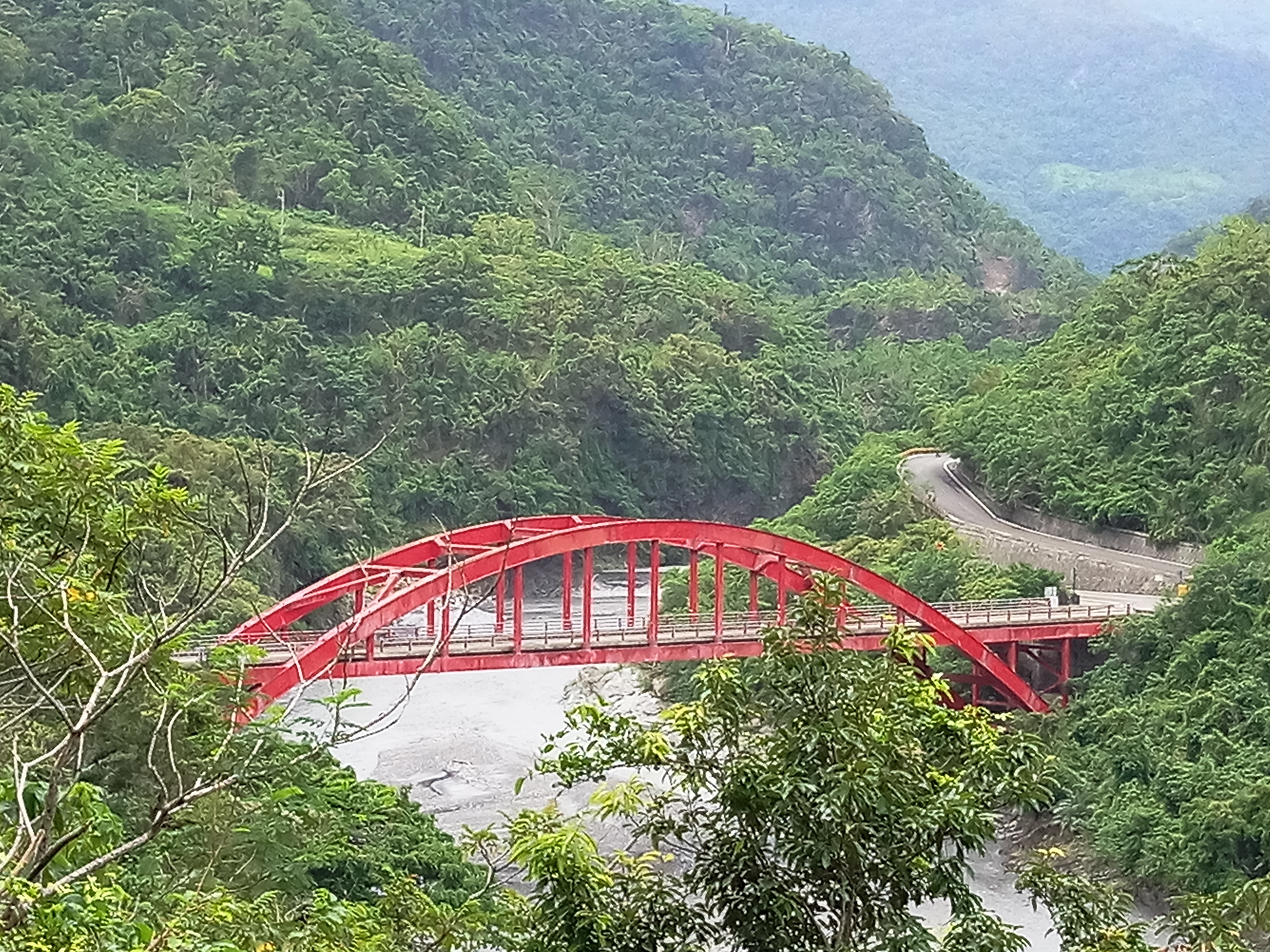 自東36鄉道遠眺紅葉橋橋身